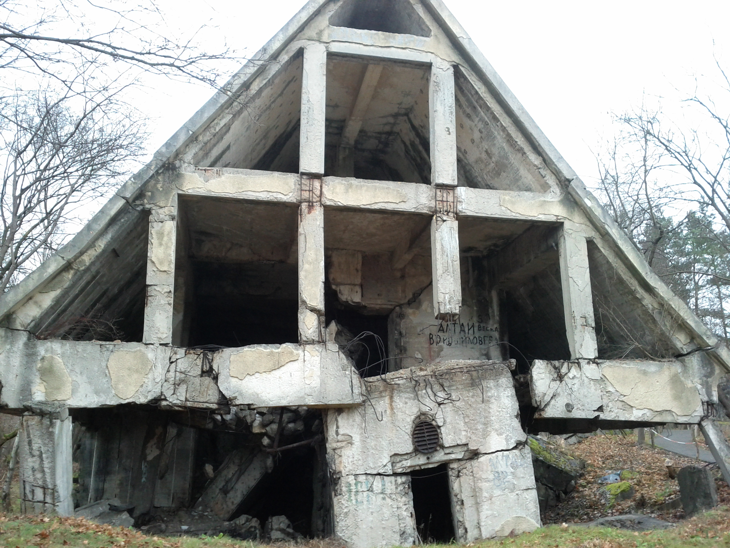 Der Bunker Wünsdorf Zeppelin.